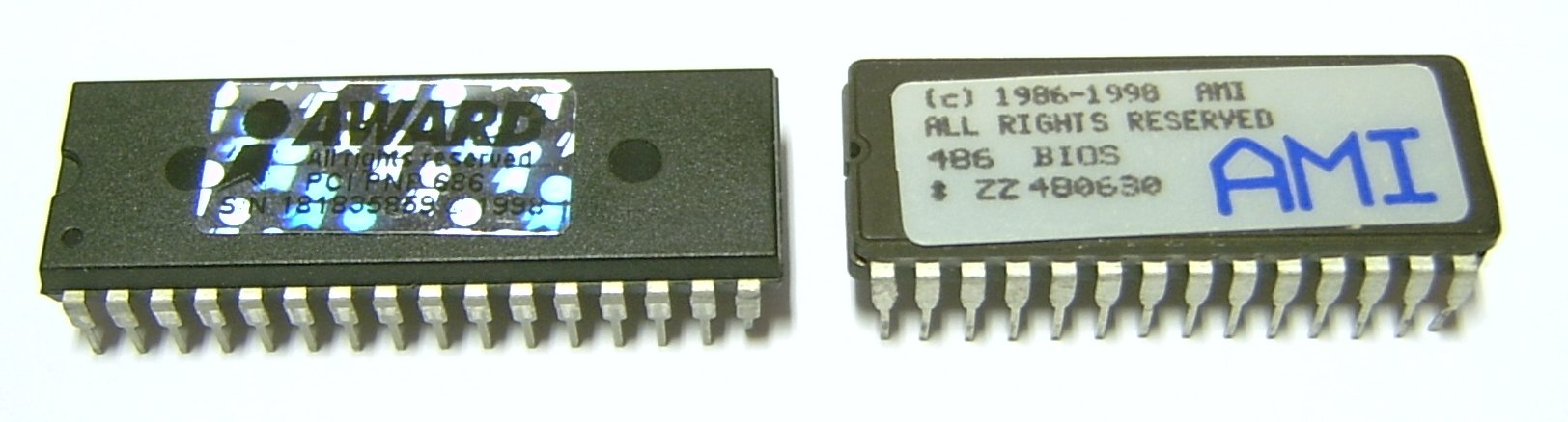 Foto eines Flash-EEPROM-ICs (links) und eines EPROM-ICs (rechts).